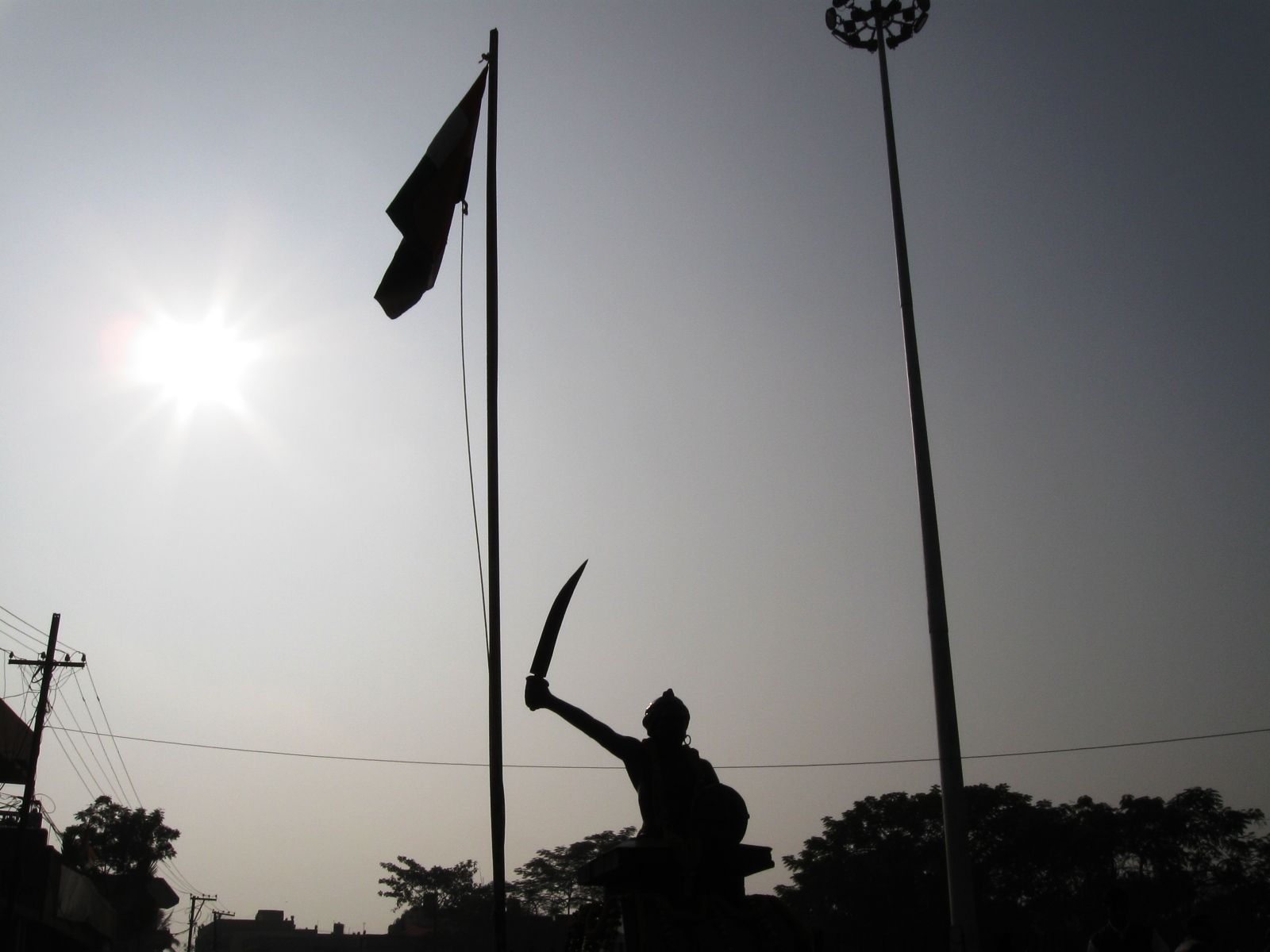 வெயிலும் நிழலும் கலந்த ஒளியில் விடுதலைப் போராட்ட வீரரின் வீரவாளும் தேசியக் கொடியும் அழகாகப் புலப்படும் காட்சி.